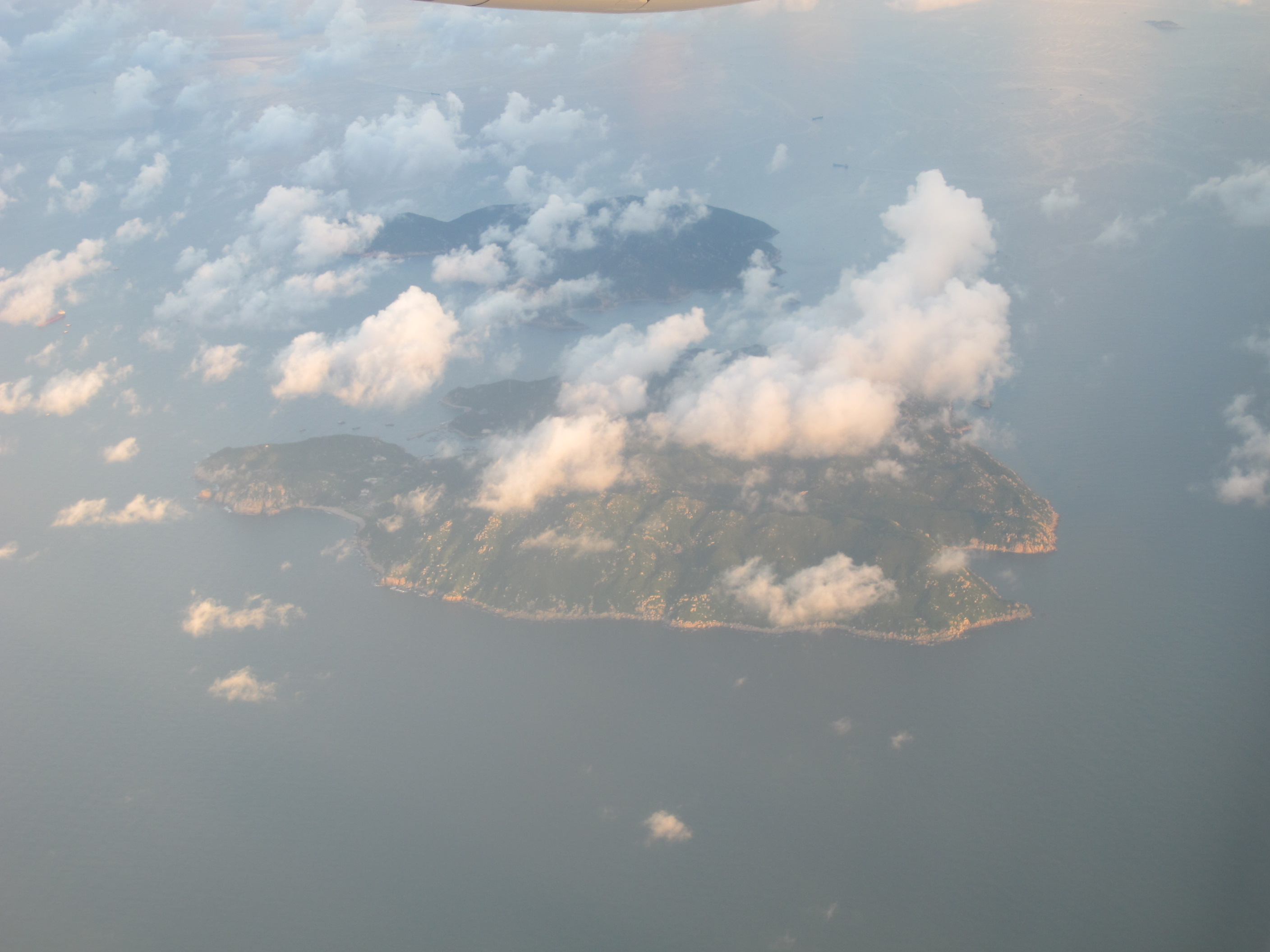 Wikimania 2013 in Hong Kong islands near Hong Kong